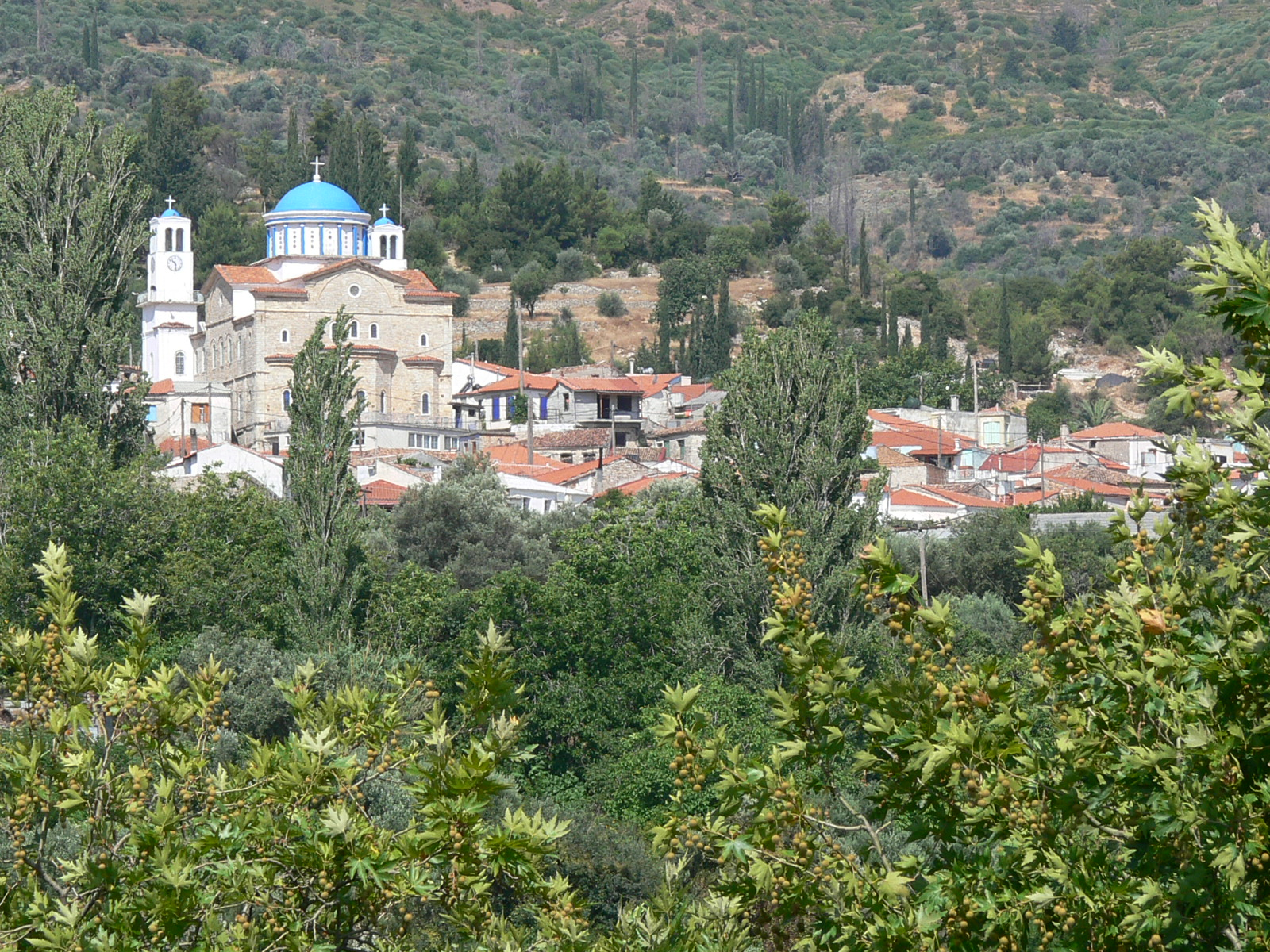 Pagondas